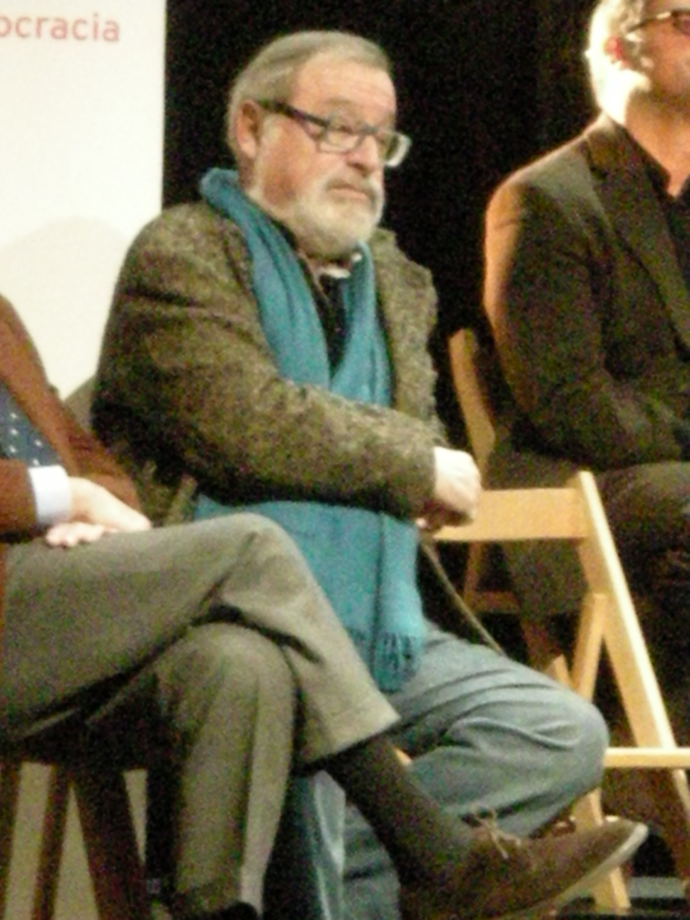 Fernando Savater en el acto de presentación de candidatos a las elecciones de 2008 de UPyD